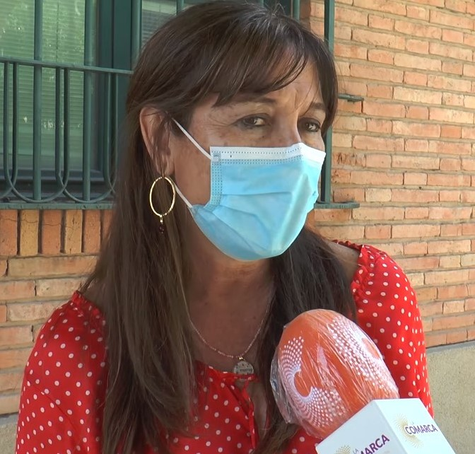 La Consejera de Sanidad del Gobierno de Aragón, Sira Repollés en Caspe (Provincia de Zaragoza) en junio de 2020.